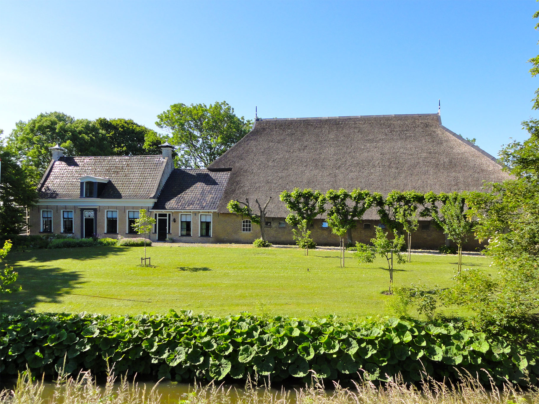 Oudebildtdijk 433 in Sint-Annaparochie